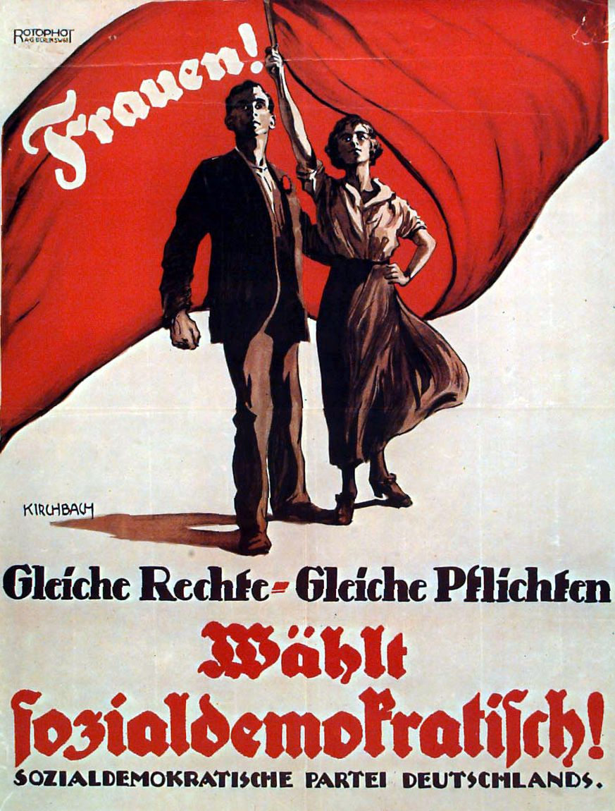 Plakat der Sozialdemokratischen Partei Deutschlands (SPD) zu den Wahlen zur Weimarer Nationalversammlung 1919, 94,5 x 71,5 cm